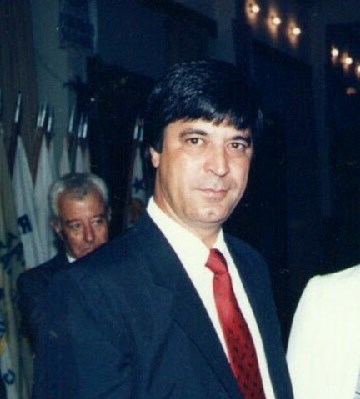 O então prefeito eleito da cidade de Teresópolis prestes a assumir seu primeiro mandato, em 1989.